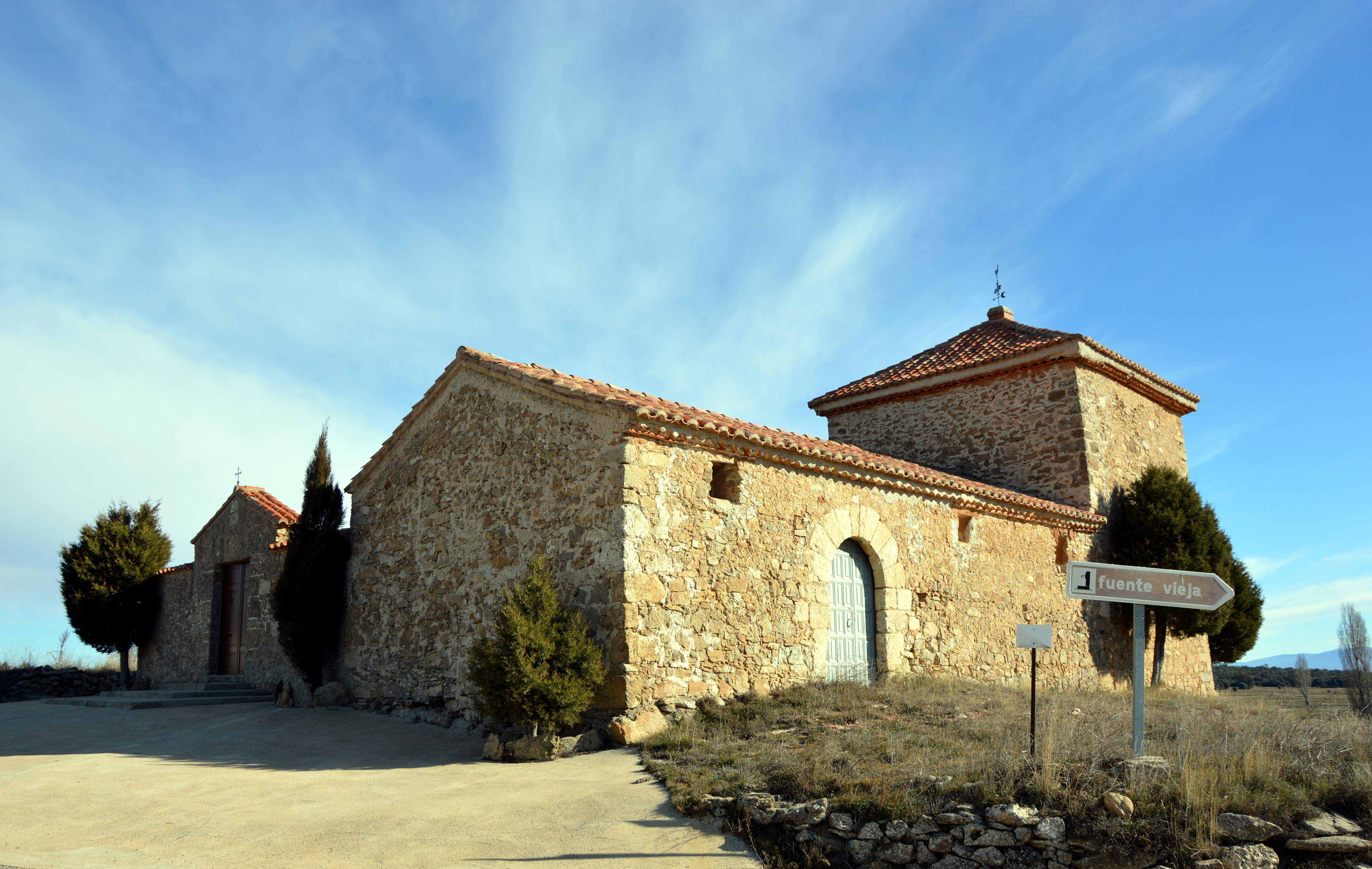 Vista general (suroccidenal) de la ermita de San Marcos, antigua ermita de la Sma. Trinidad en Veguillas de la Sierra (Teruel), siglo XVII.